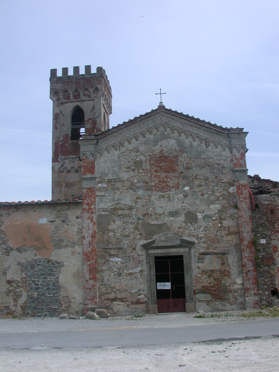 Badia Pozzeveri- Abbazia camaldolese di S.Pietro (IX sec.)